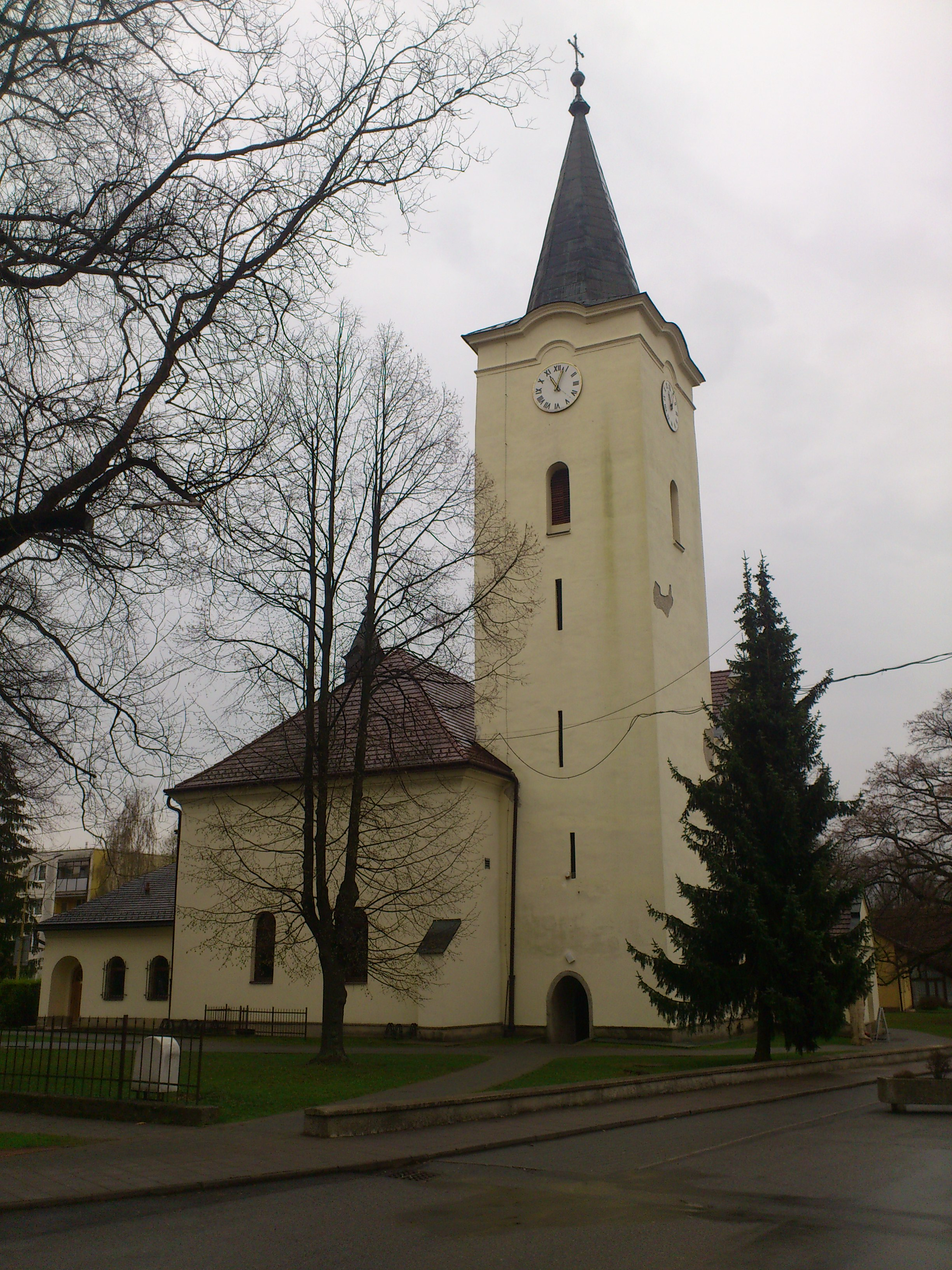 Kostol sv. Martina v Lipanoch